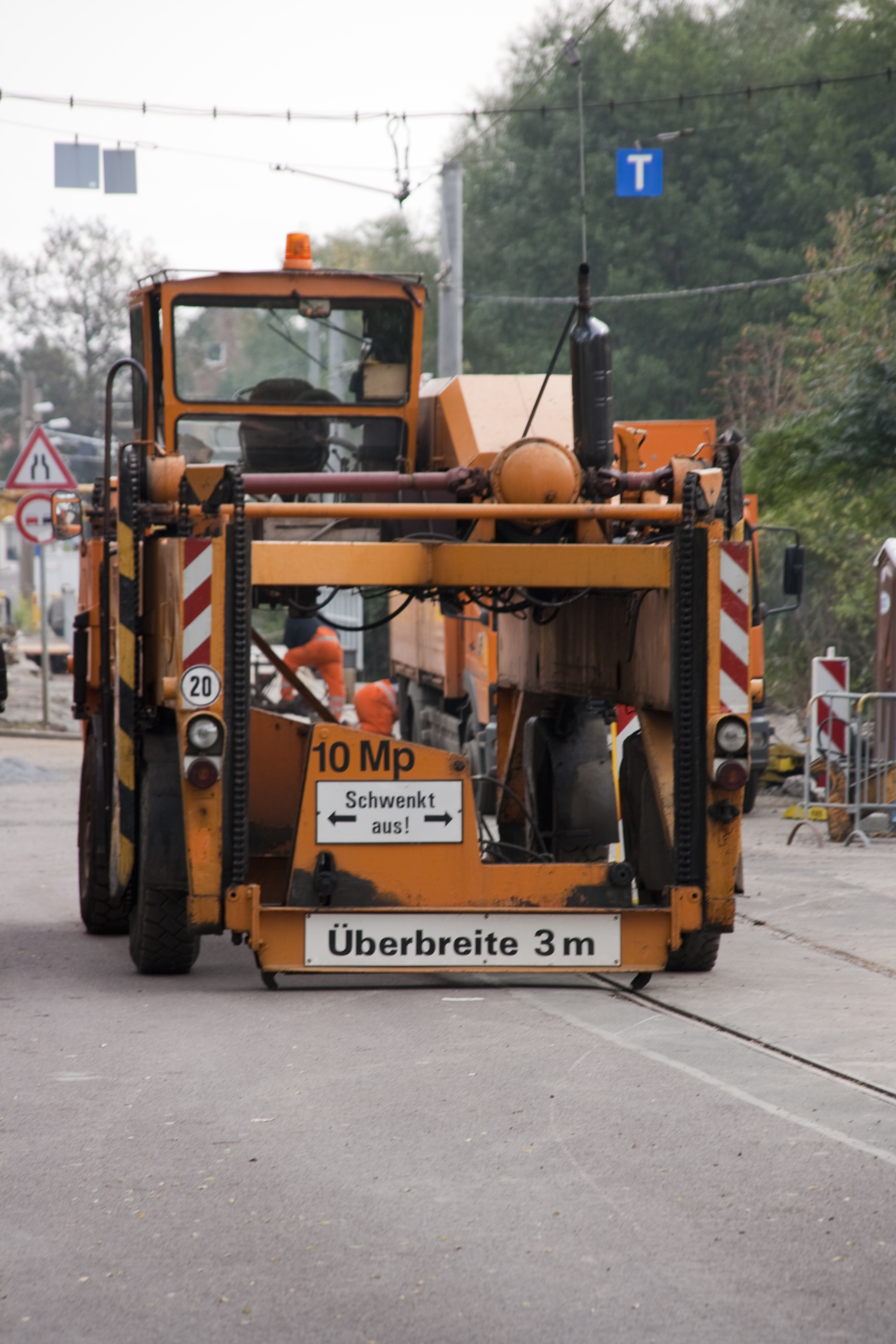 VALMET Torlader - Großverbundplattentransport und Montagegerät